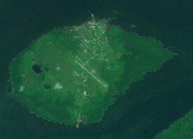 Daru Island view